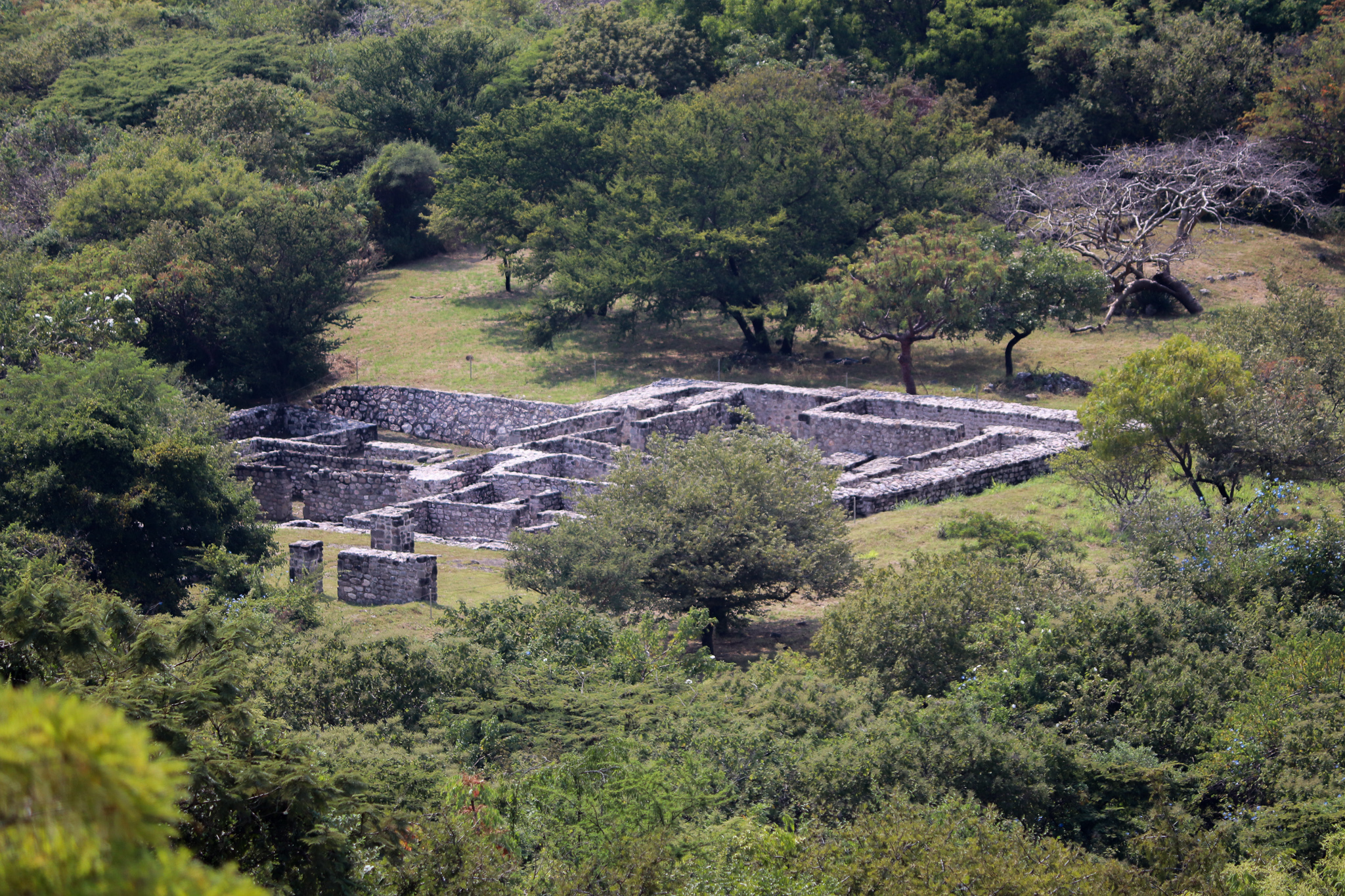 Estructura de piedra, lejos del resto de la ciudad, sin acceso público.